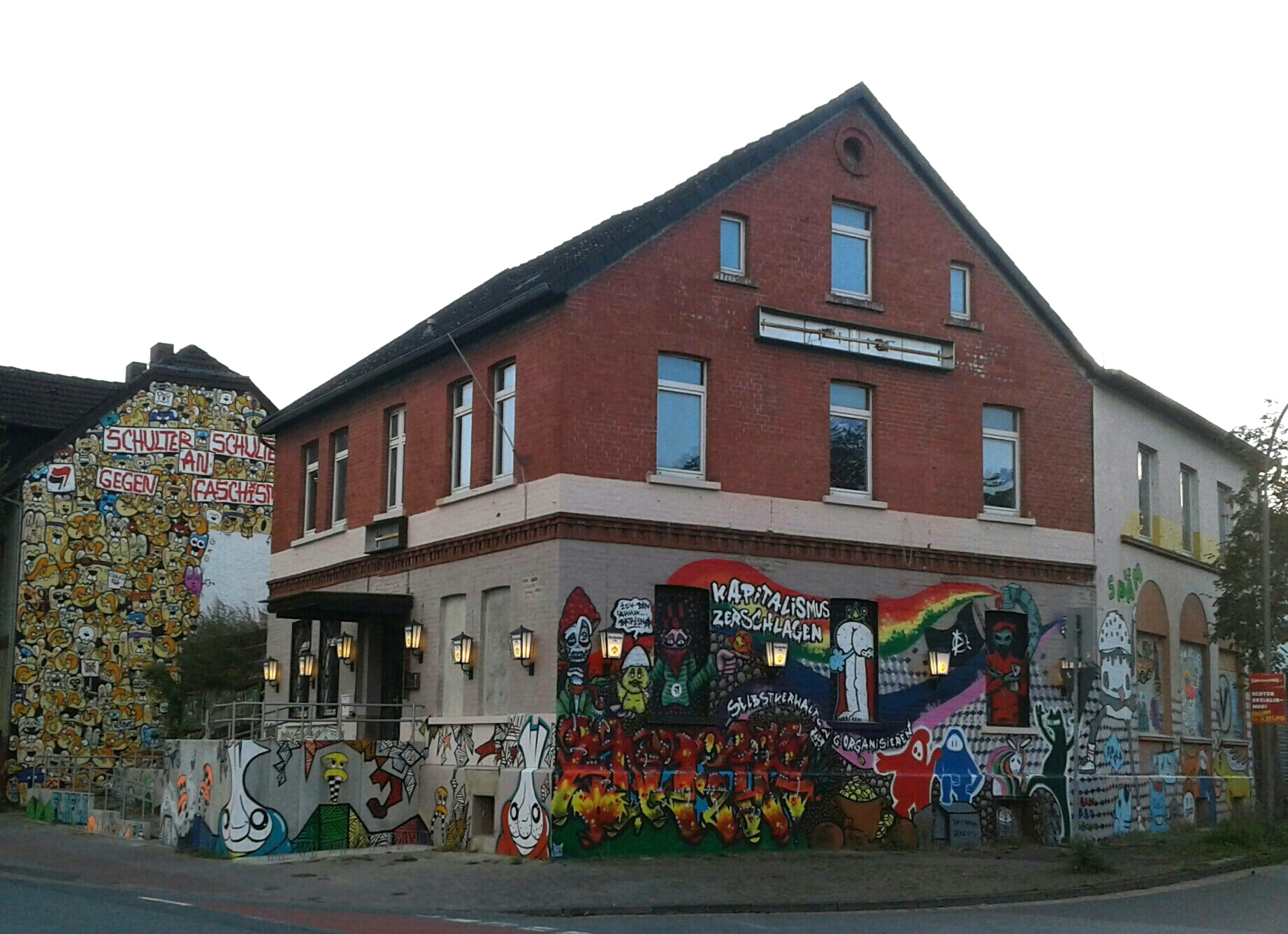 Ajz Flafla nach der Renovierung